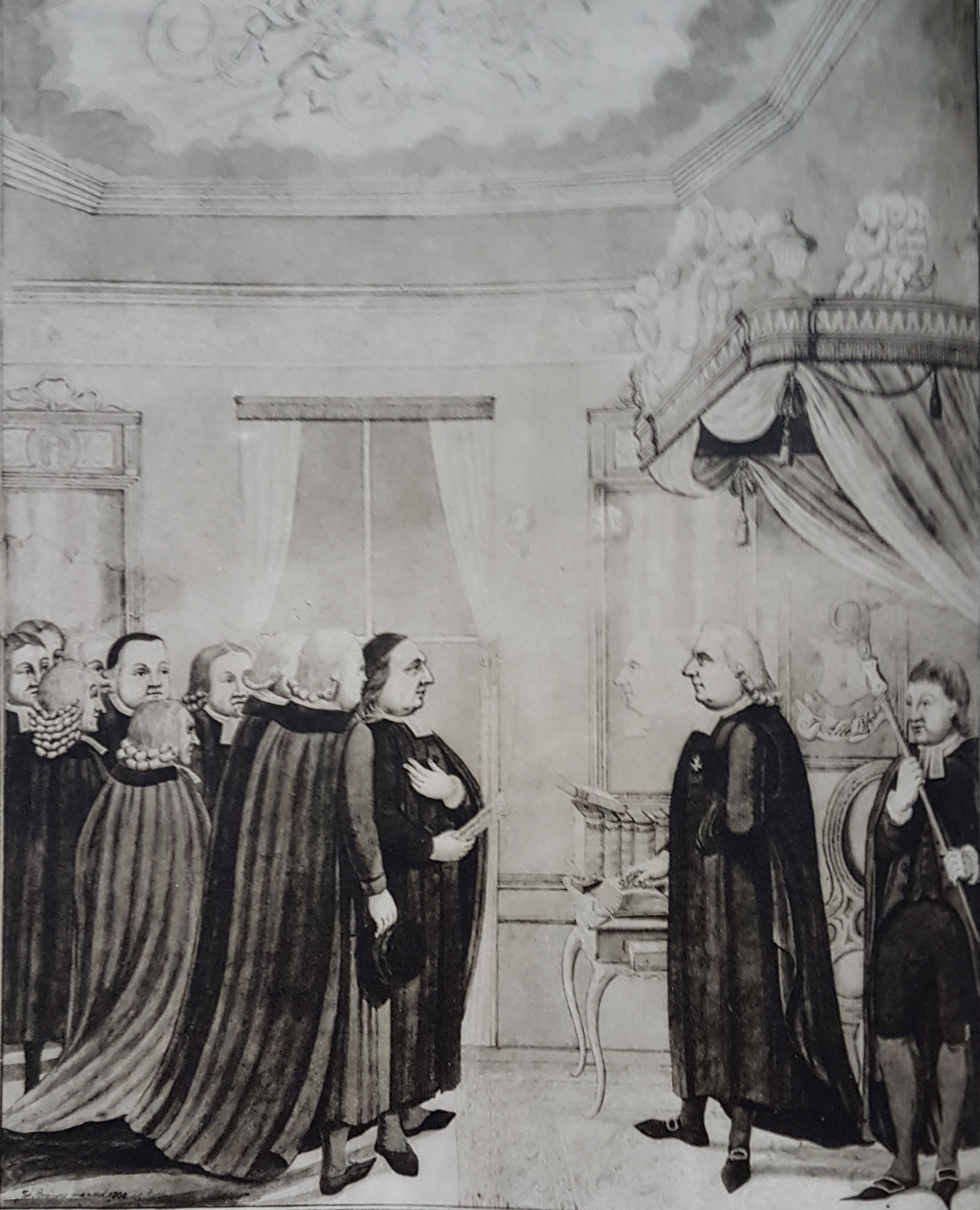 Biskop Jacob Lindblom och lagman Lars Axel Liljestolpe avbildade av Jan Branders i akvarell 1805, avfotograferad bild från Allhems Svenskt konstnärslexikon.